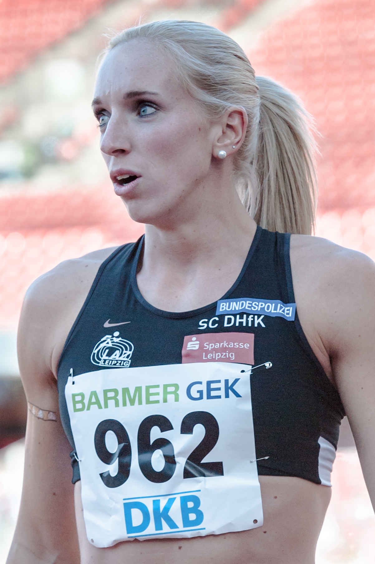 Deutsche Leichtathletik-Meisterschaften 2015: Cindy Roleder, SC DHFK Leipzig